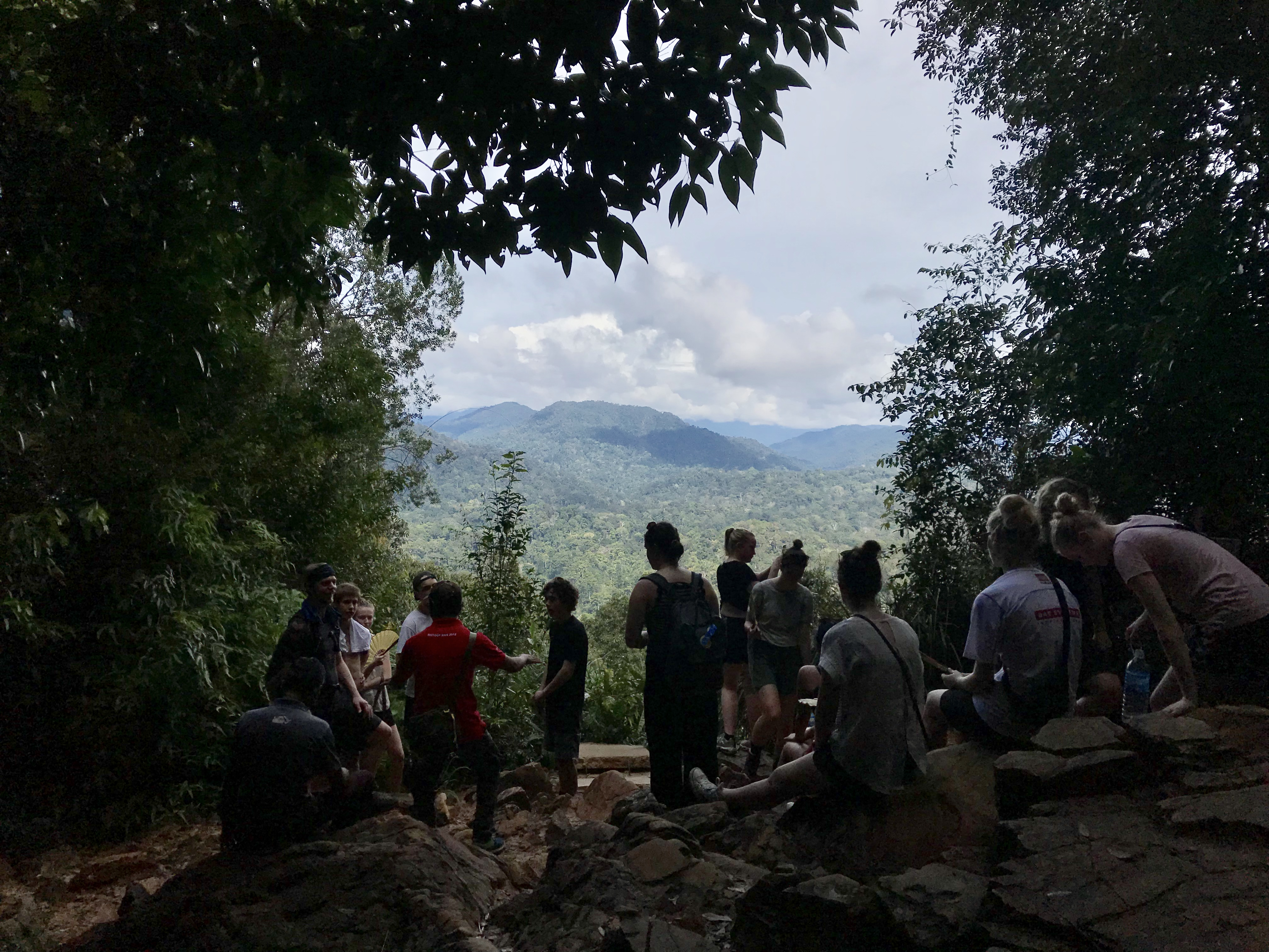 Malaysia_REC